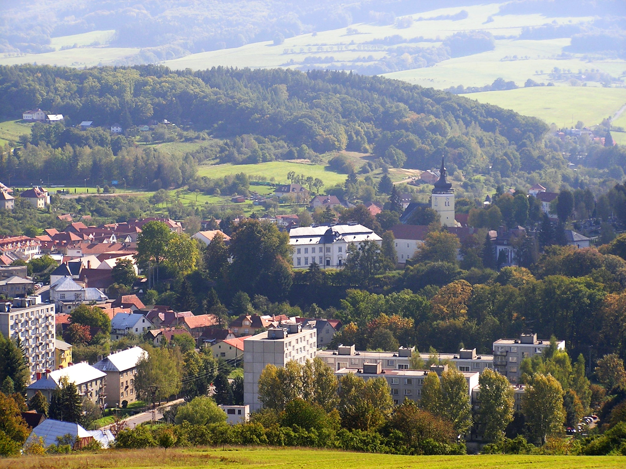 Vizovice, pohled z kopce